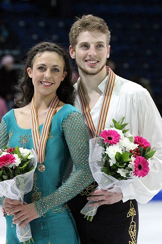 Александра Олдридж и Даниэль Эатон (США) на подиуме чемпионата мира по фигурному катанию среди юниоров 2012